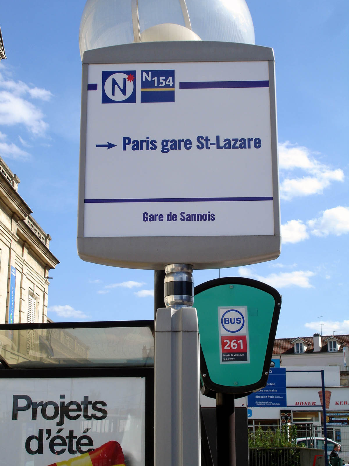 La gare de Sannois, Val-d'Oise, France.